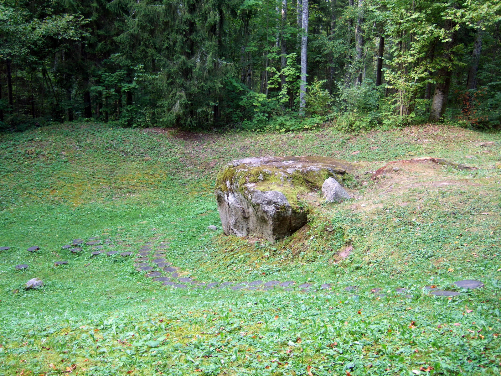 Lygumų akmuo iš šono